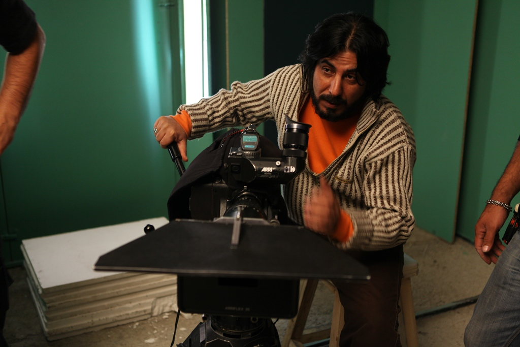 پشت صحنه فیلم بدون اجازه